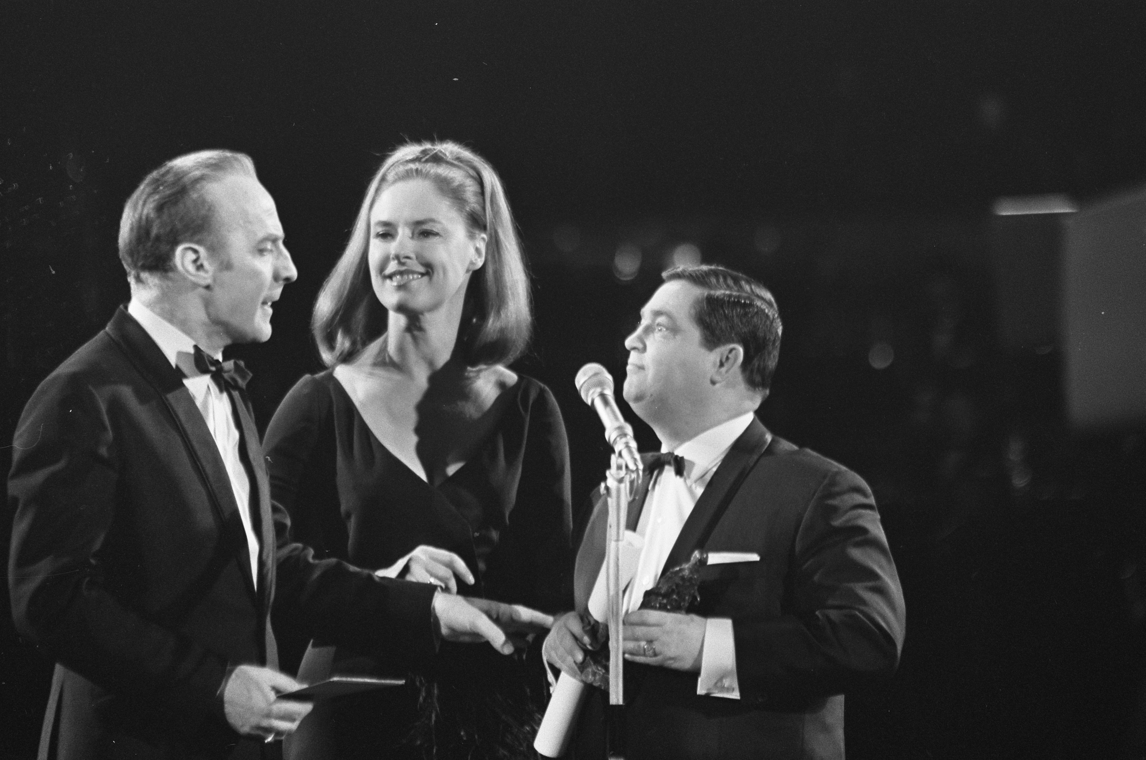 Collectie / Archief : Fotocollectie Anefo Reportage / Serie : Grand Gala du Disque 1968 Beschrijving : Grand Gala du Disque in de RAI. Wim Sonneveld, Ina van Faassen en Willy Alberti Datum : 8 maart 1968 Locatie : Amsterdam Trefwoorden : artiesten Persoonsnaam : Alberti, Willy, Faassen, Ina van, Sonneveld, Wim Fotograaf : Fotograaf Onbekend / Anefo, [onbekend] Auteursrechthebbende : Nationaal Archief Materiaalsoort : Negatief (zwart/wit) Nummer archiefinventaris : bekijk toegang 2.24.01.05 Bestanddeelnummer : 921-1484